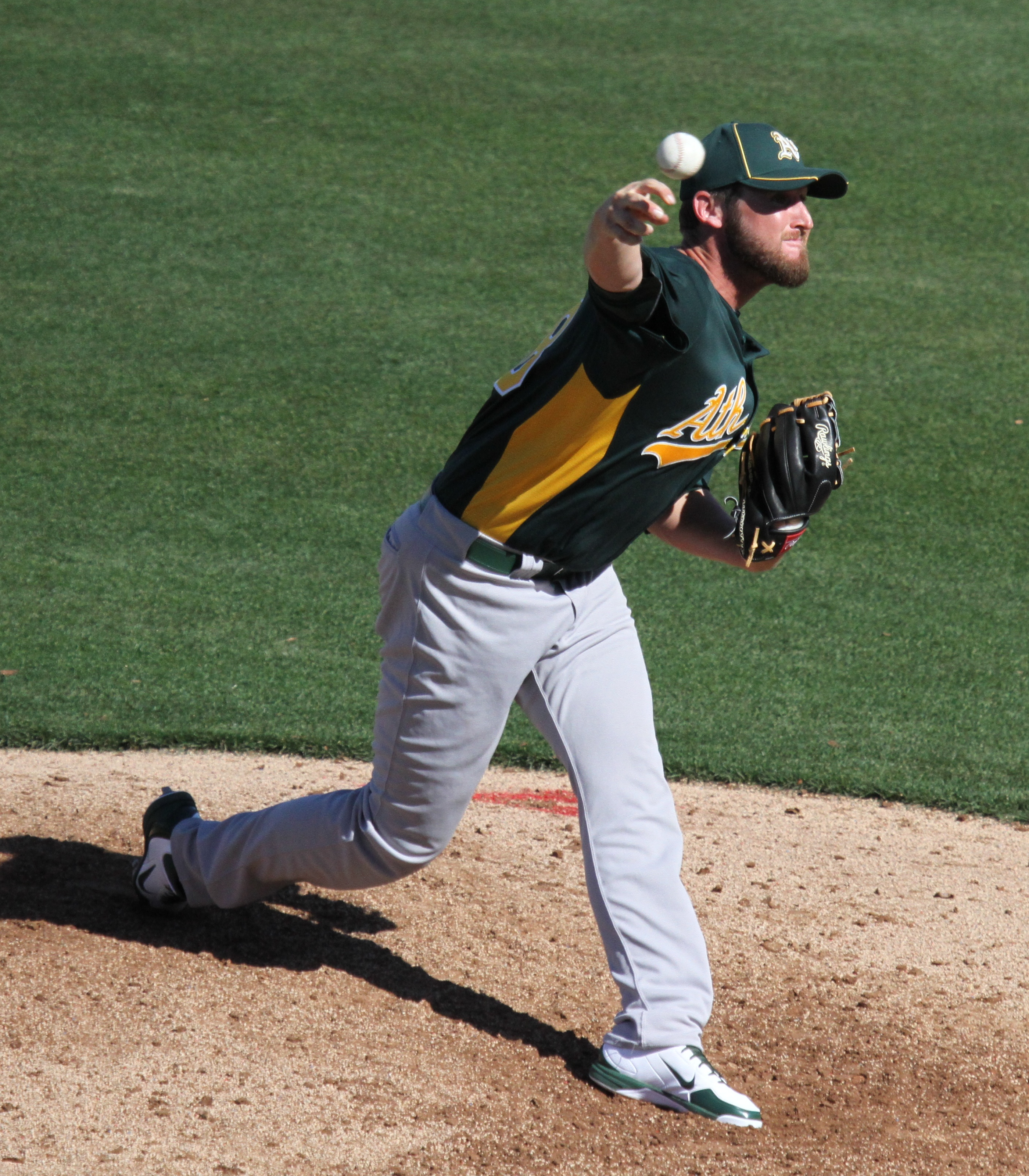 Ryan Cook